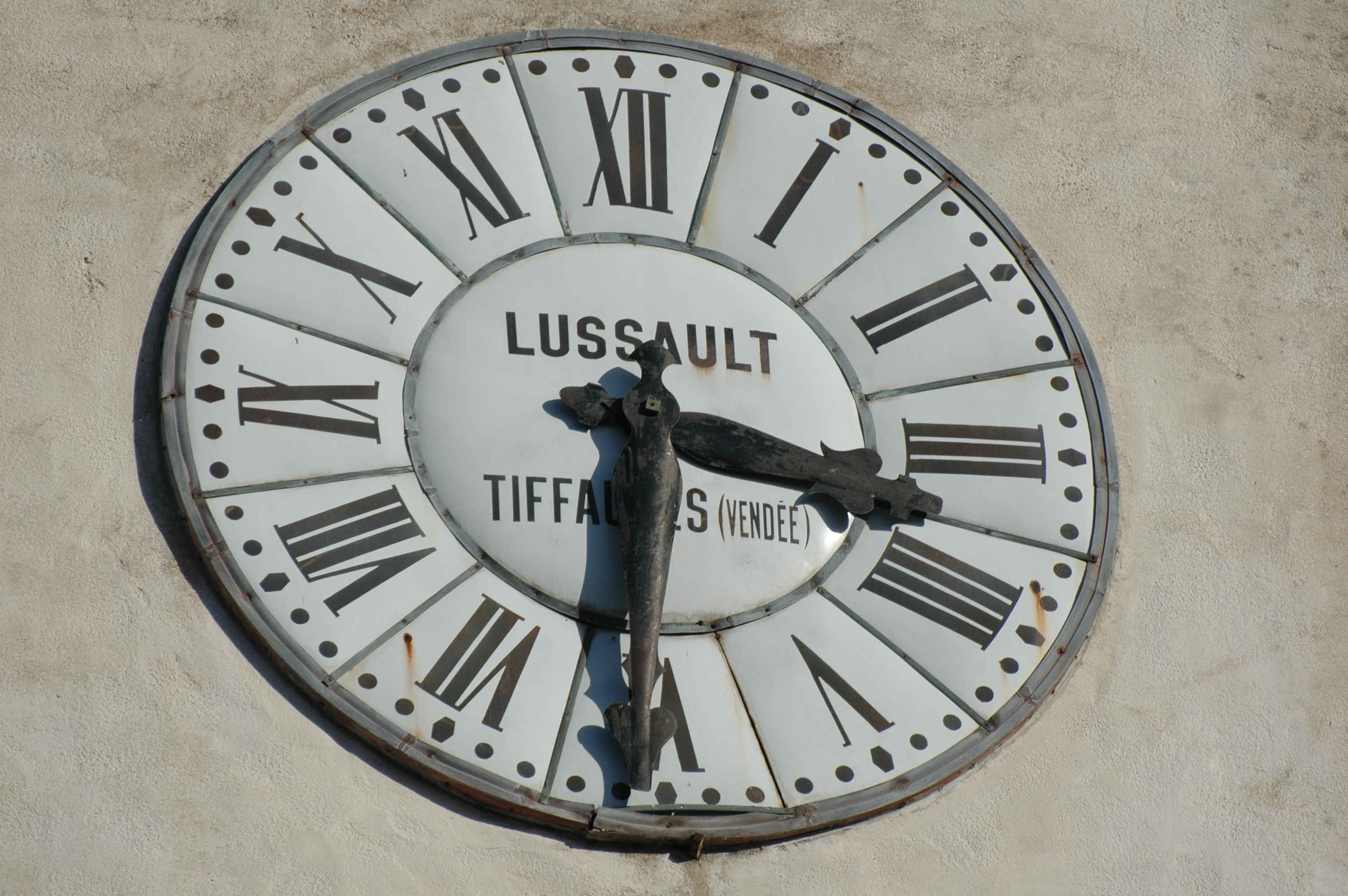 Ascain, Pyrénées Atlantiques, France, horloge de l'église